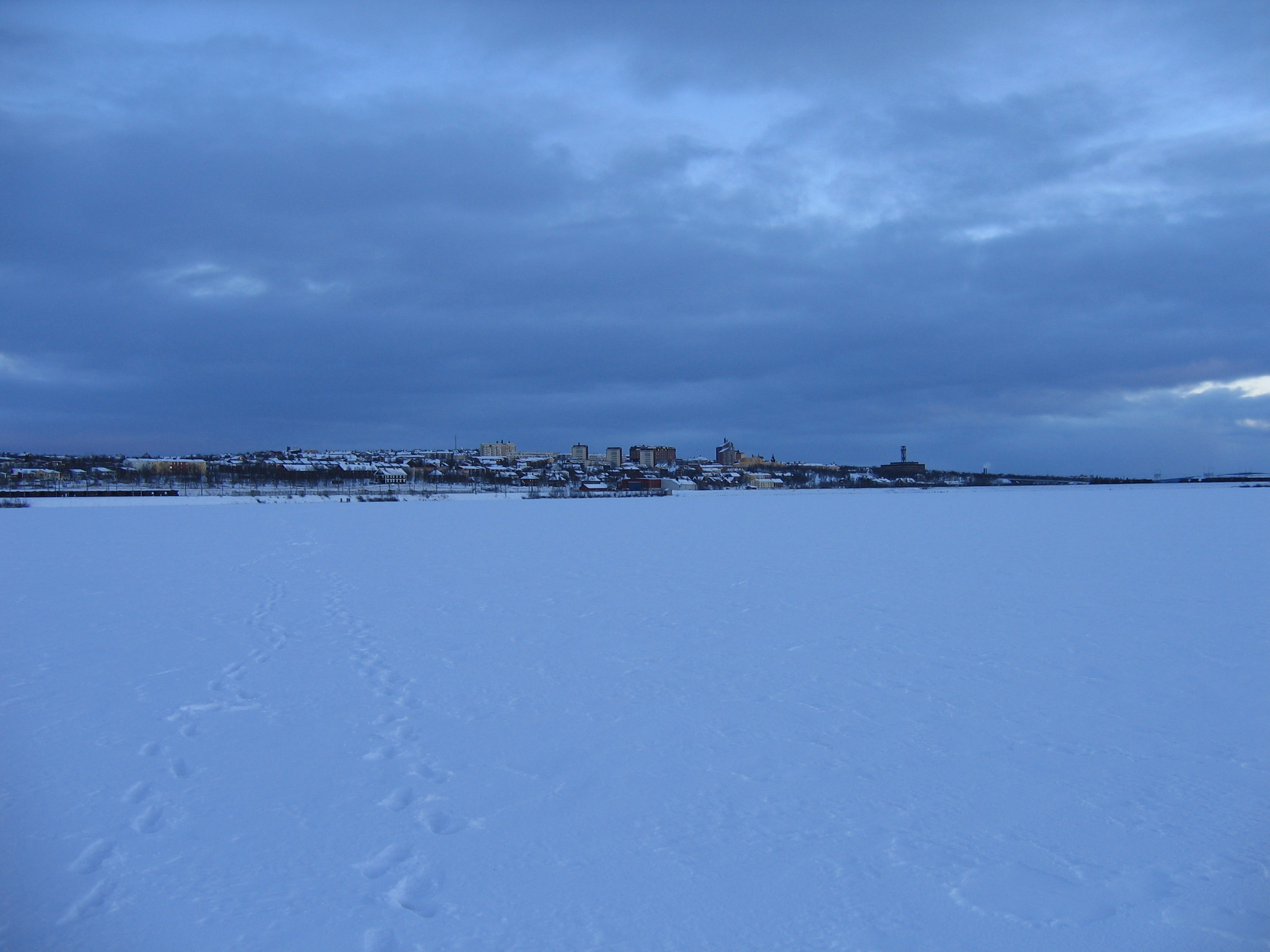 Kiruna, Lappland, Sweden, as seen from Luossajärvi.